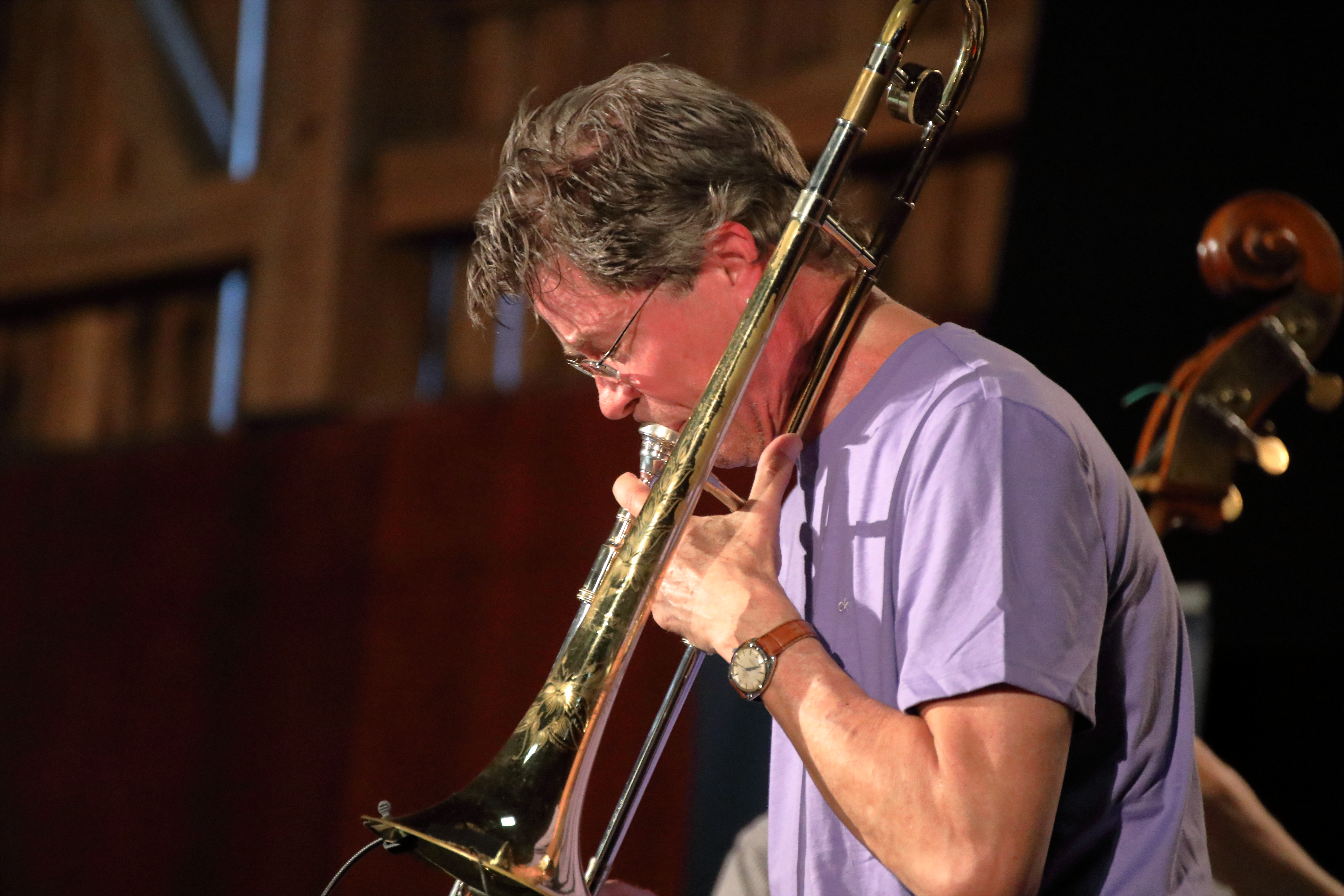 Ray Anderson (tb), Han Bennink (dr), Ernst Glerum (db) und Paul van Kemenade (alto sax) auf dem INNtöne Jazzfestival 2019.